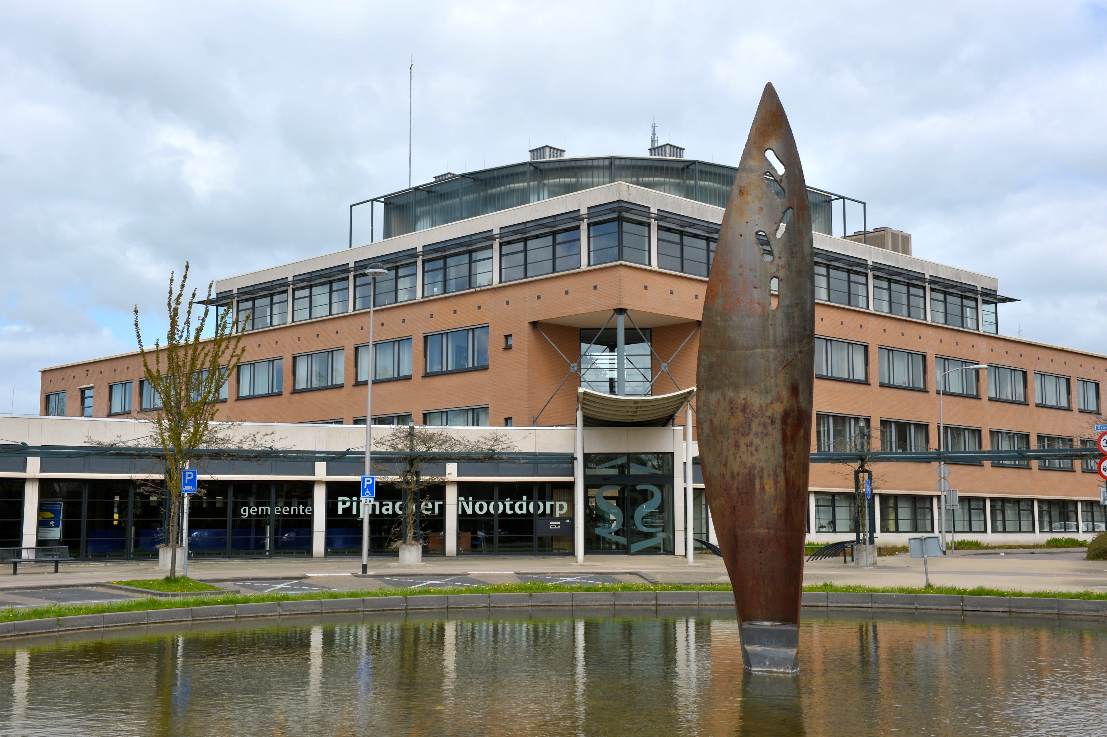 'Kroontjespen' (1997) van kunstenaar Ruud van de Wint (Den Helder 1942-2006).